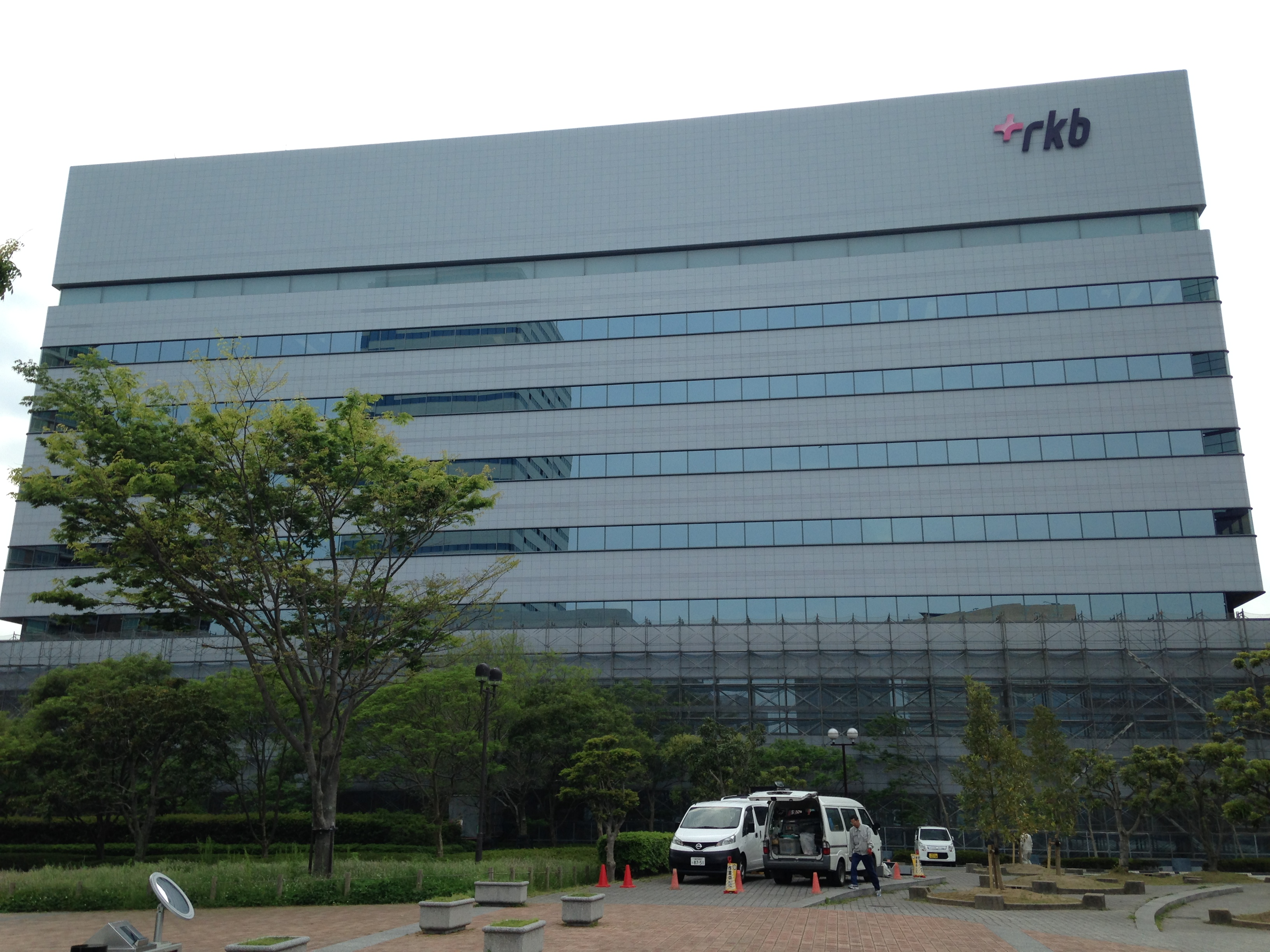 RKB放送会館